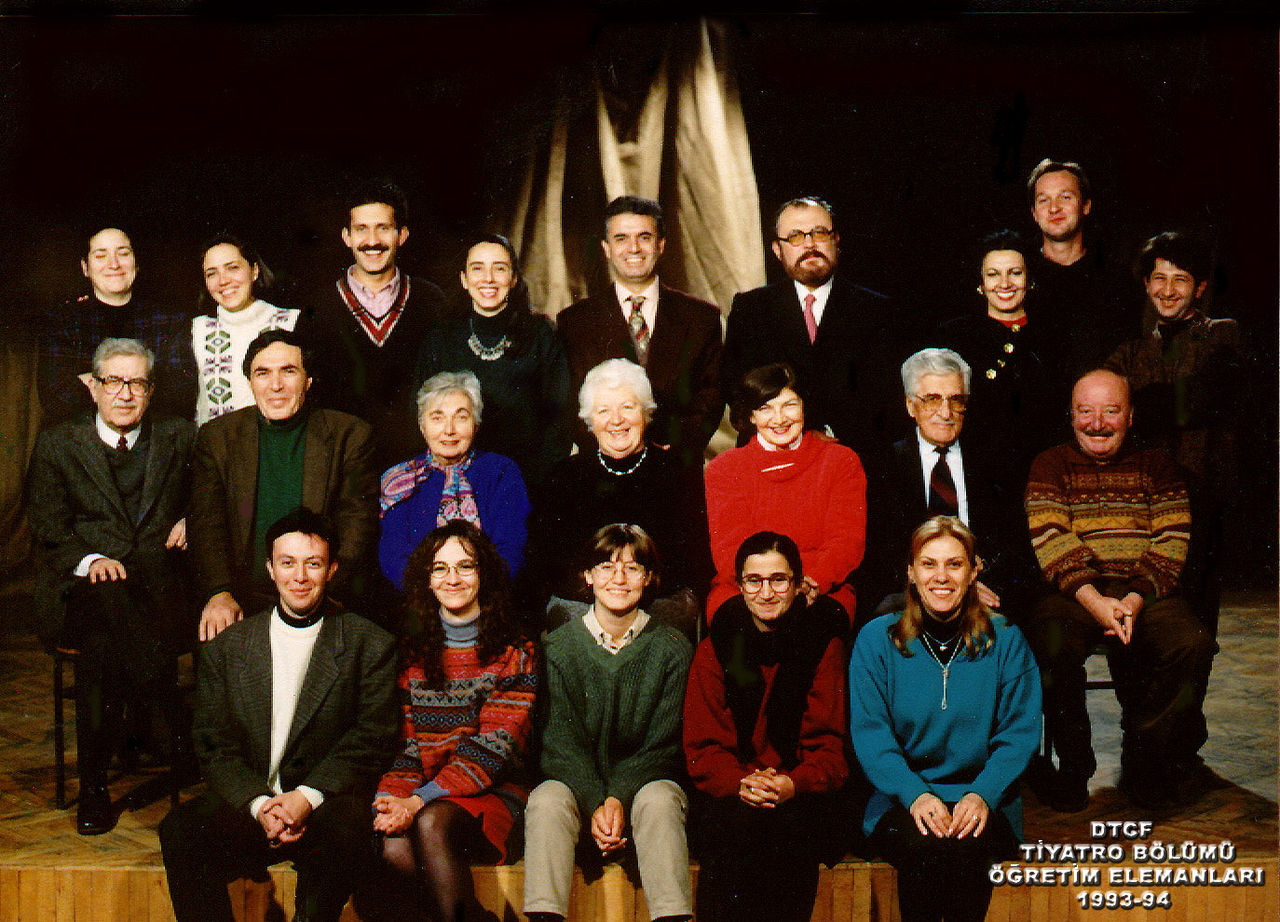 27 Mart 1994 tarihinde Ankara Unv. DTCF Tiyatro Bolumu sahnesinde, Canon Ftb ve sehpa ile cekilmistir